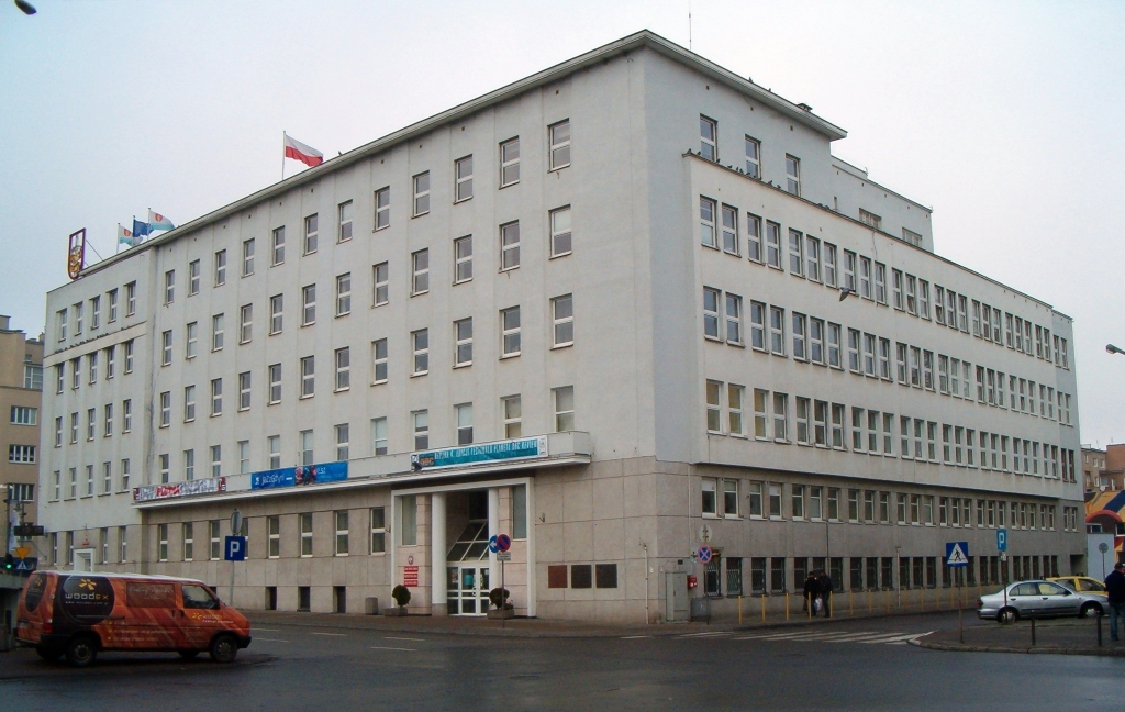 Urząd Miasta Gdyni.